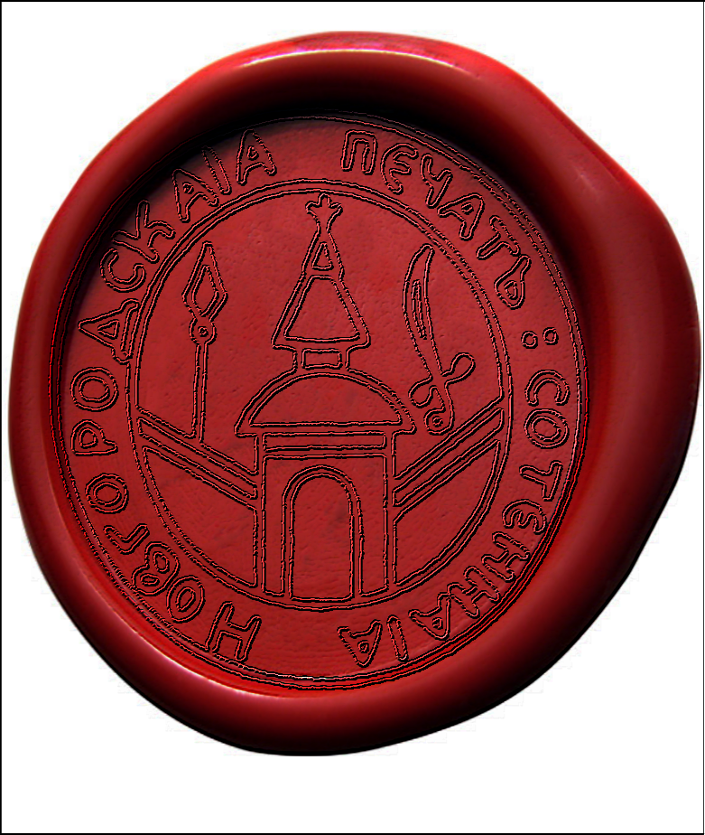 Печатка Новгород-Сіверської сотні. Реконструкція